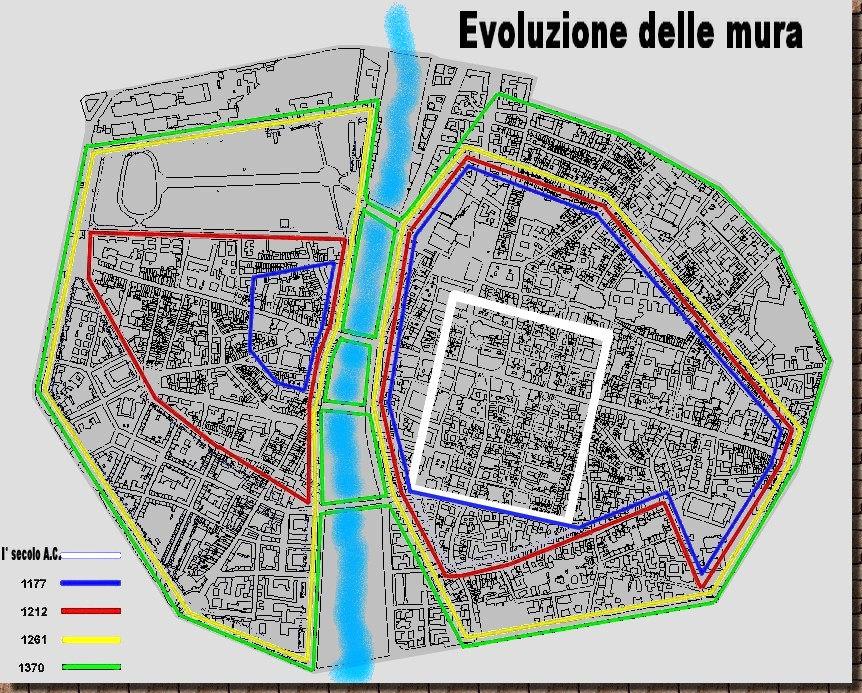 L'evoluzione delle mura di Parma durante i secoli. Ho realizzato questa mappa ispirandomi liberamente da differenti fonti bibliografiche, tra le quali: "Le mura di Parma". Parma, Banca del monte di Parma, Battei, 1979-1980 e "I luoghi della storia": atlante topografico parmigiano. Parma, PPS editrice.